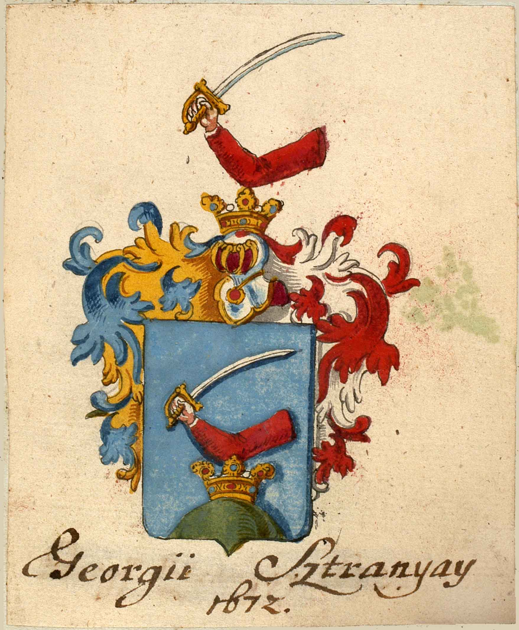 A Sztrányay család címere Adami kéziratos művében